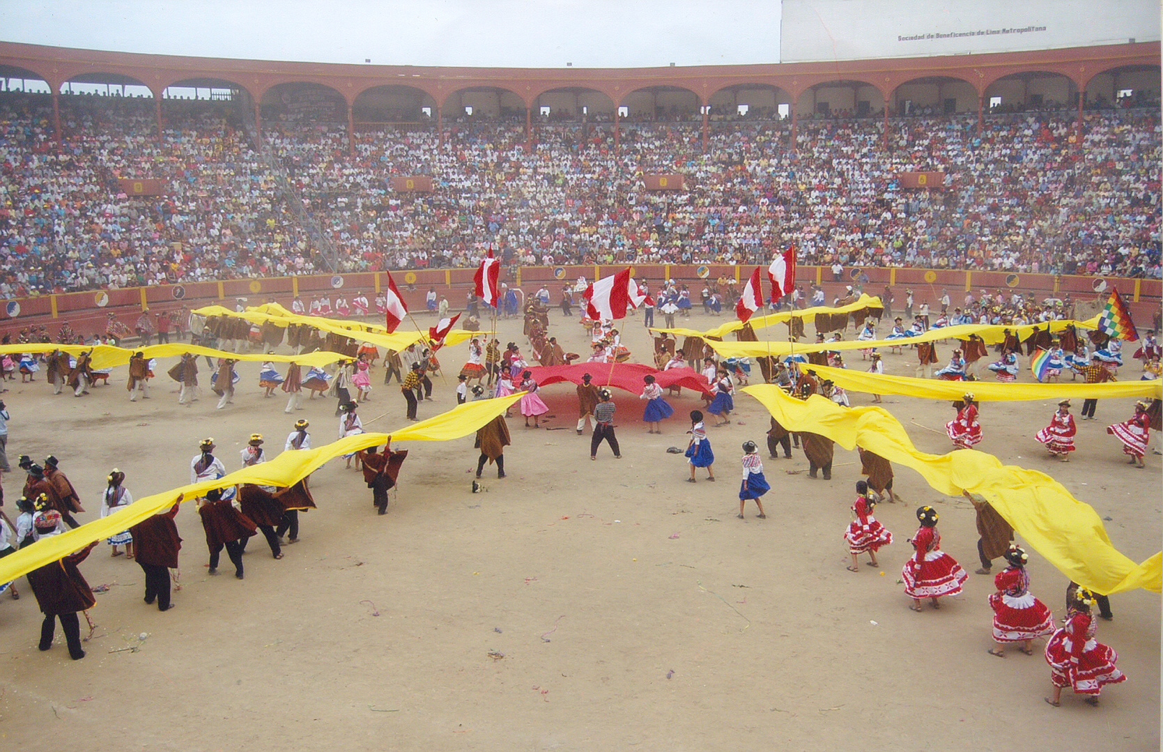 Coreografía de la Comparsa de la Federación Fajardina en el XX Concurso Carnaval Vencedores de Ayacucho realizado en la Plaza de Acho - Lima